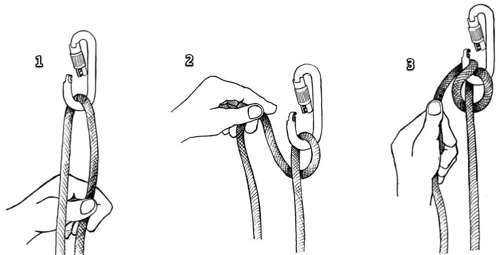 Halbmastwurfsicherung anlegen.